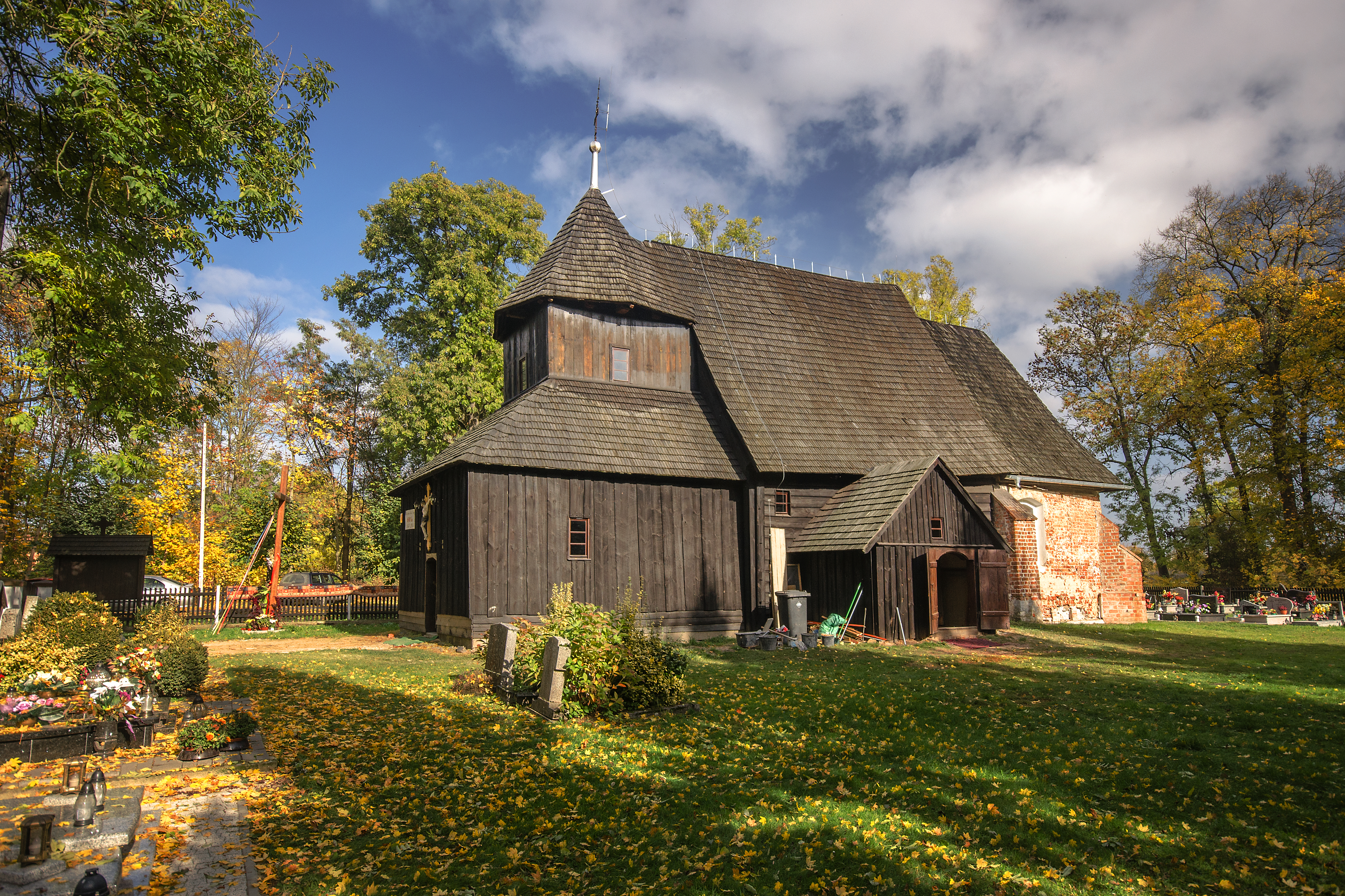 Baldwinowice, kościół fil. p.w. Św. Trójcy, 1414, 1562, XVII